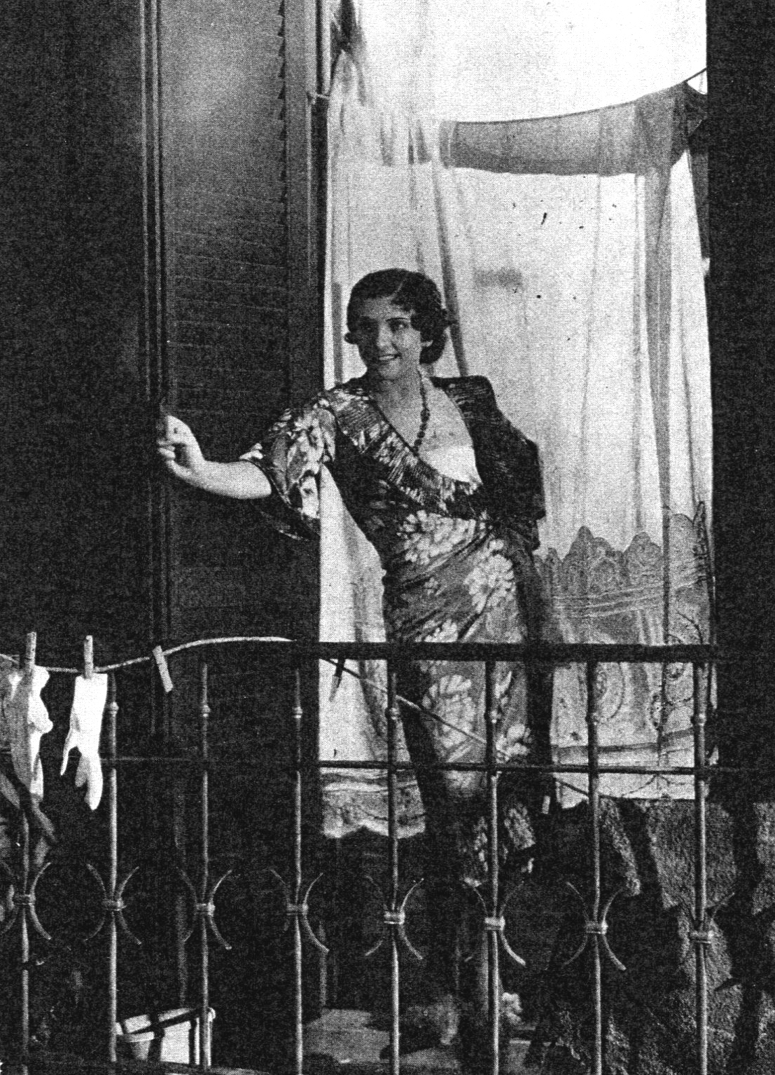 Ragazzo, regia di Ivo Perilli 1934 - produz "Cines" Roma, foto di scena con Isa Pola